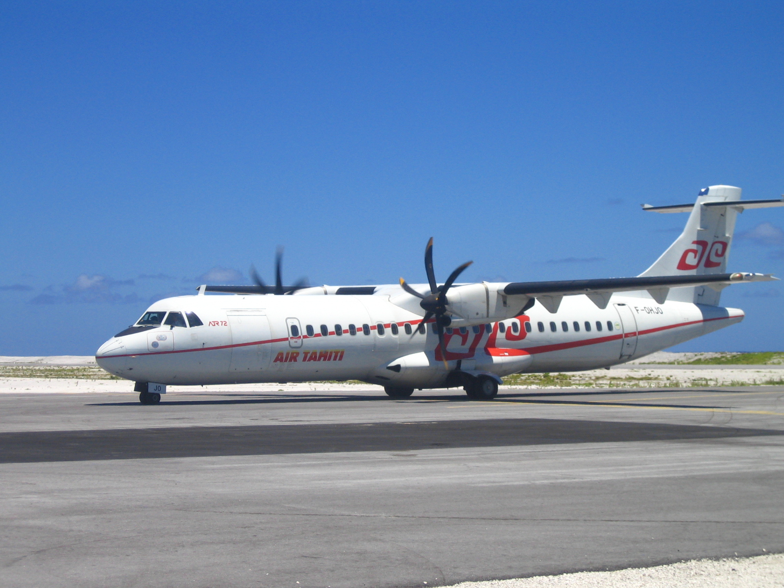 ATR 72 d'Air Tahiti en Polynésie française